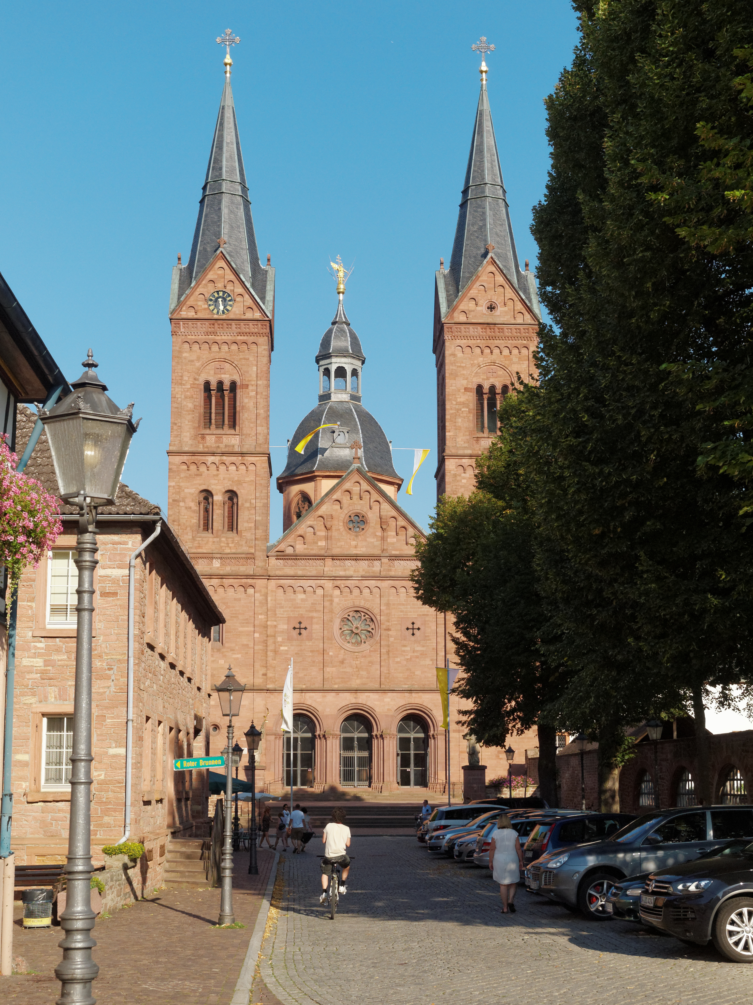 Westseite von St. Marcellinus und Petrus, Basilica minor, in Seligenstadt, Baudenkmal in Hessen